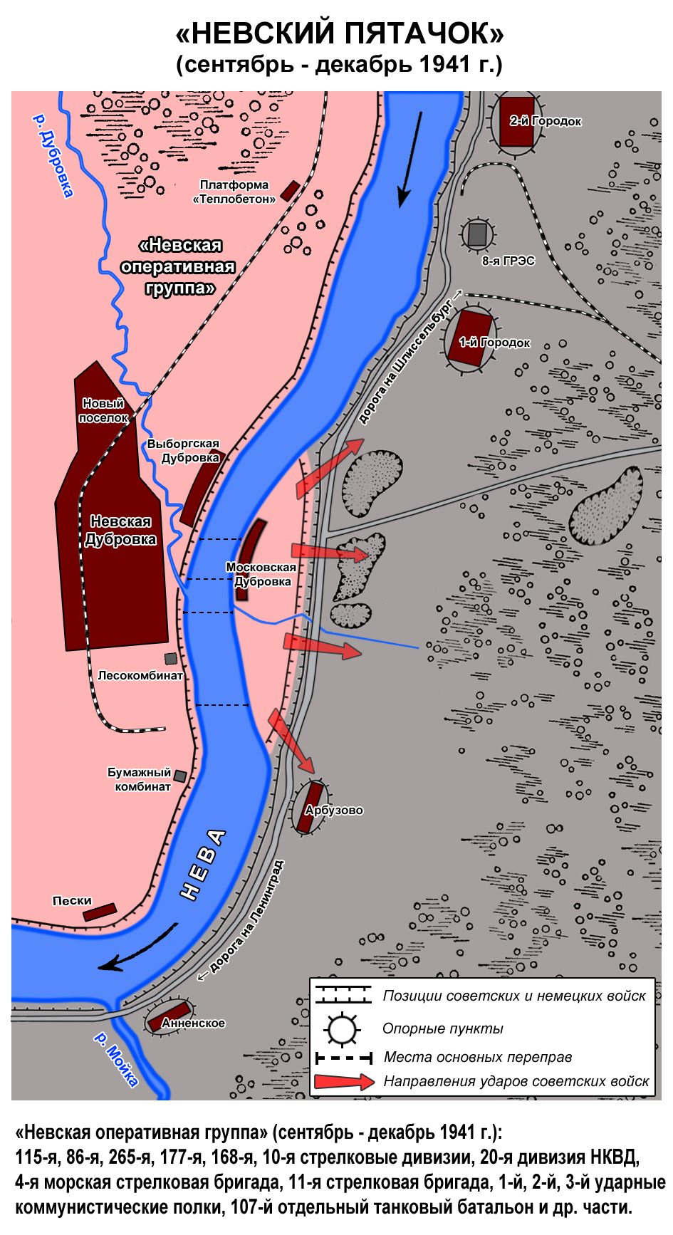 Боевые действия в районе "Невского пятачка" в сентябре-декабре 1941 г.